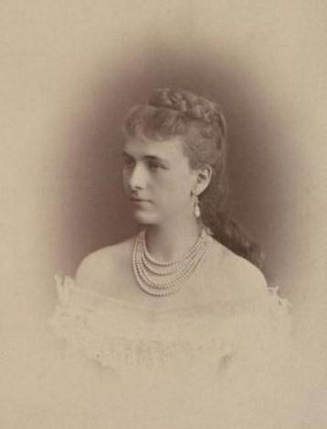 Графиня Мария Михайловна Берг (1850—1907), урождённая Долгорукая, в первом браке Мещерская.